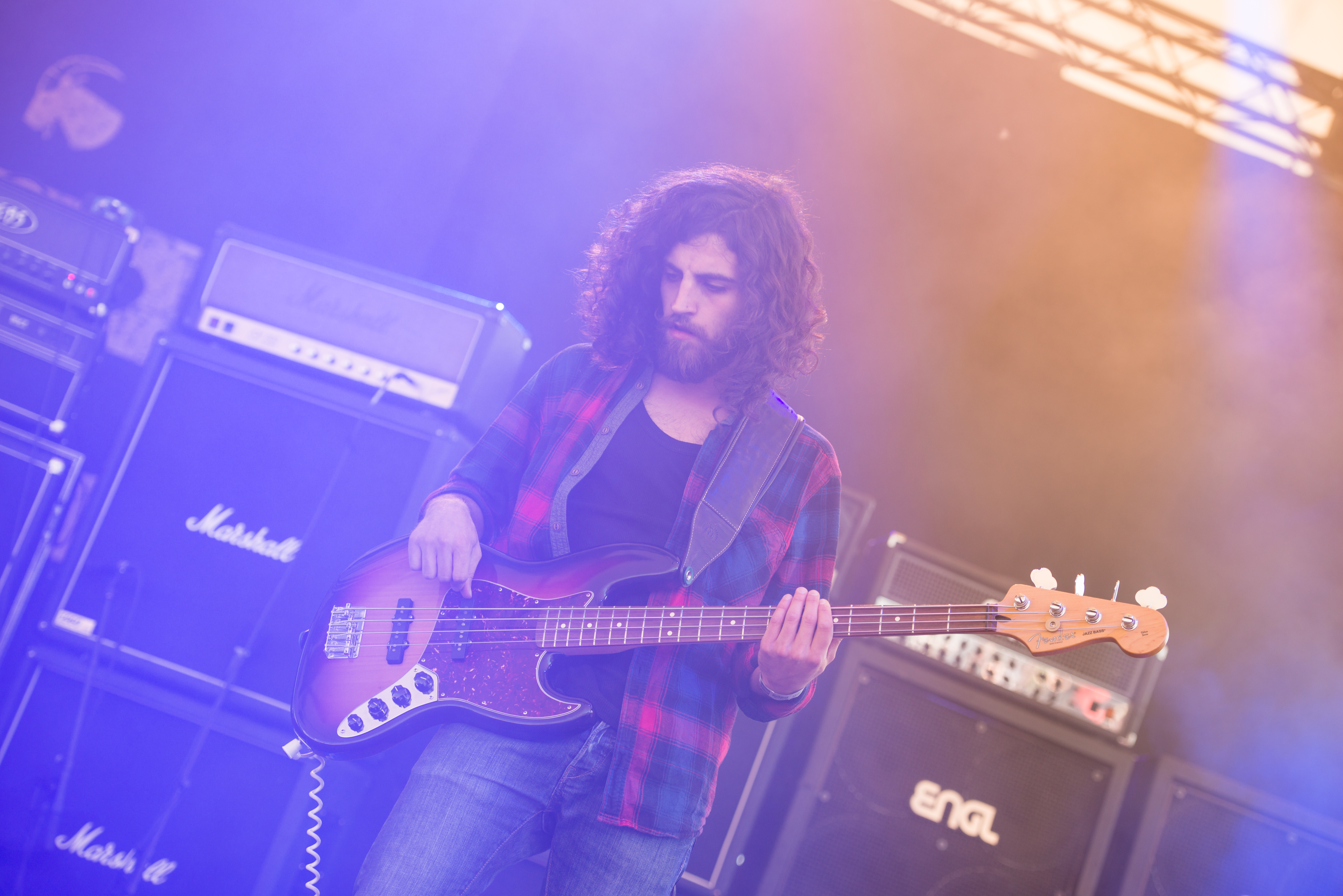 'Rock Hard Festival 2014 - Gelsenkirchen': 'Zodiac'